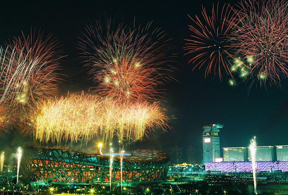 北京奥运会开幕式烟花